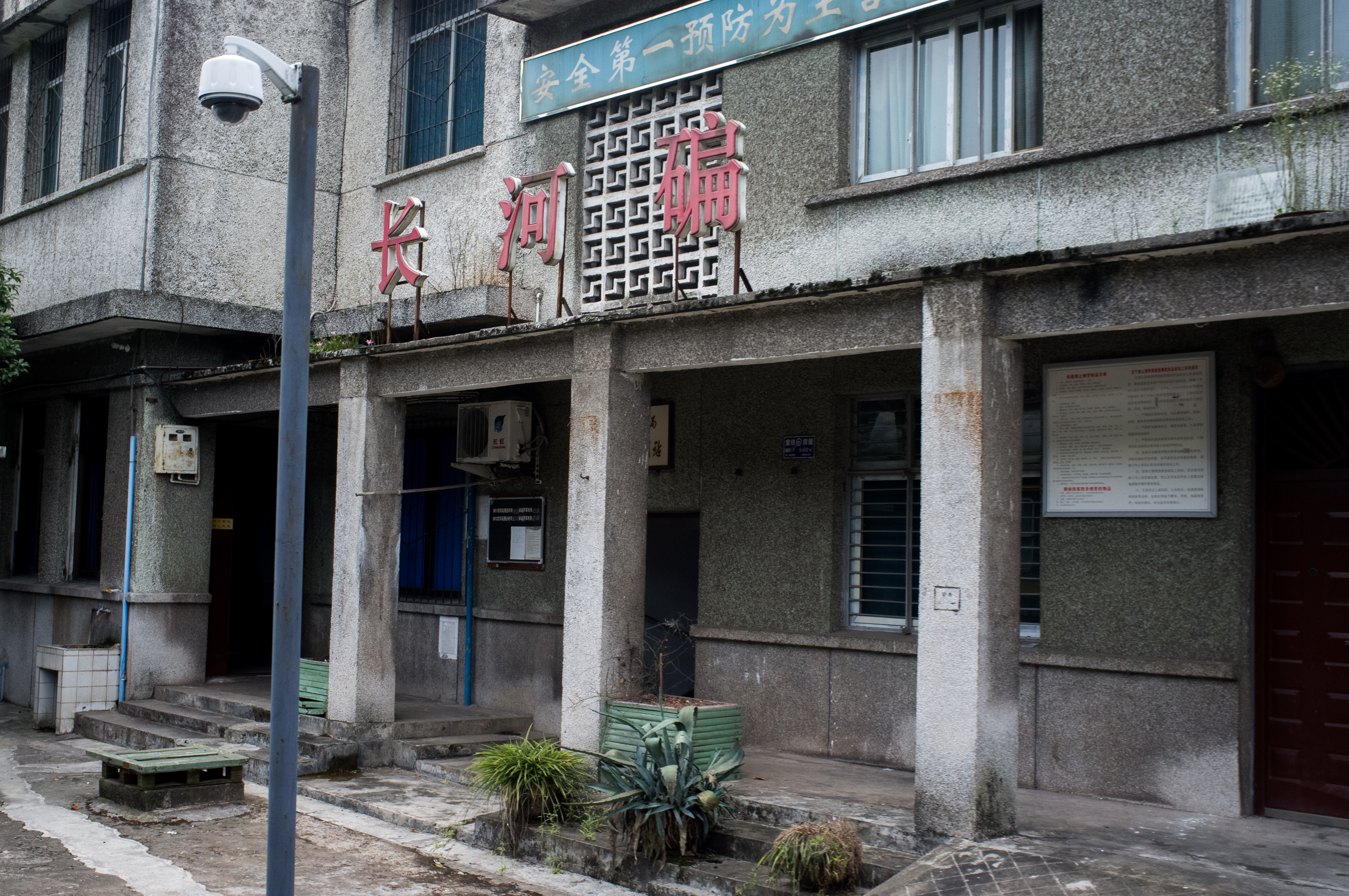 中文（中国大陆）: 成渝铁路长河碥站